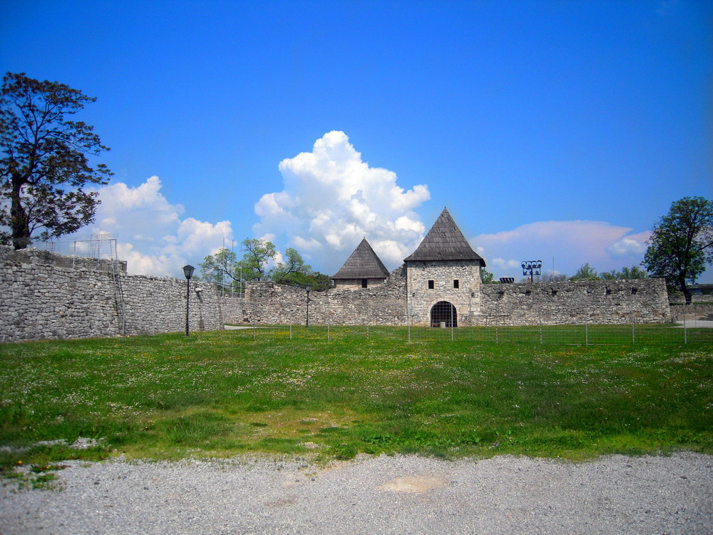 Kastel